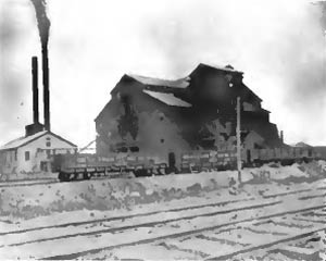 Gillespie, Illinois, c.1900 (coal mine)